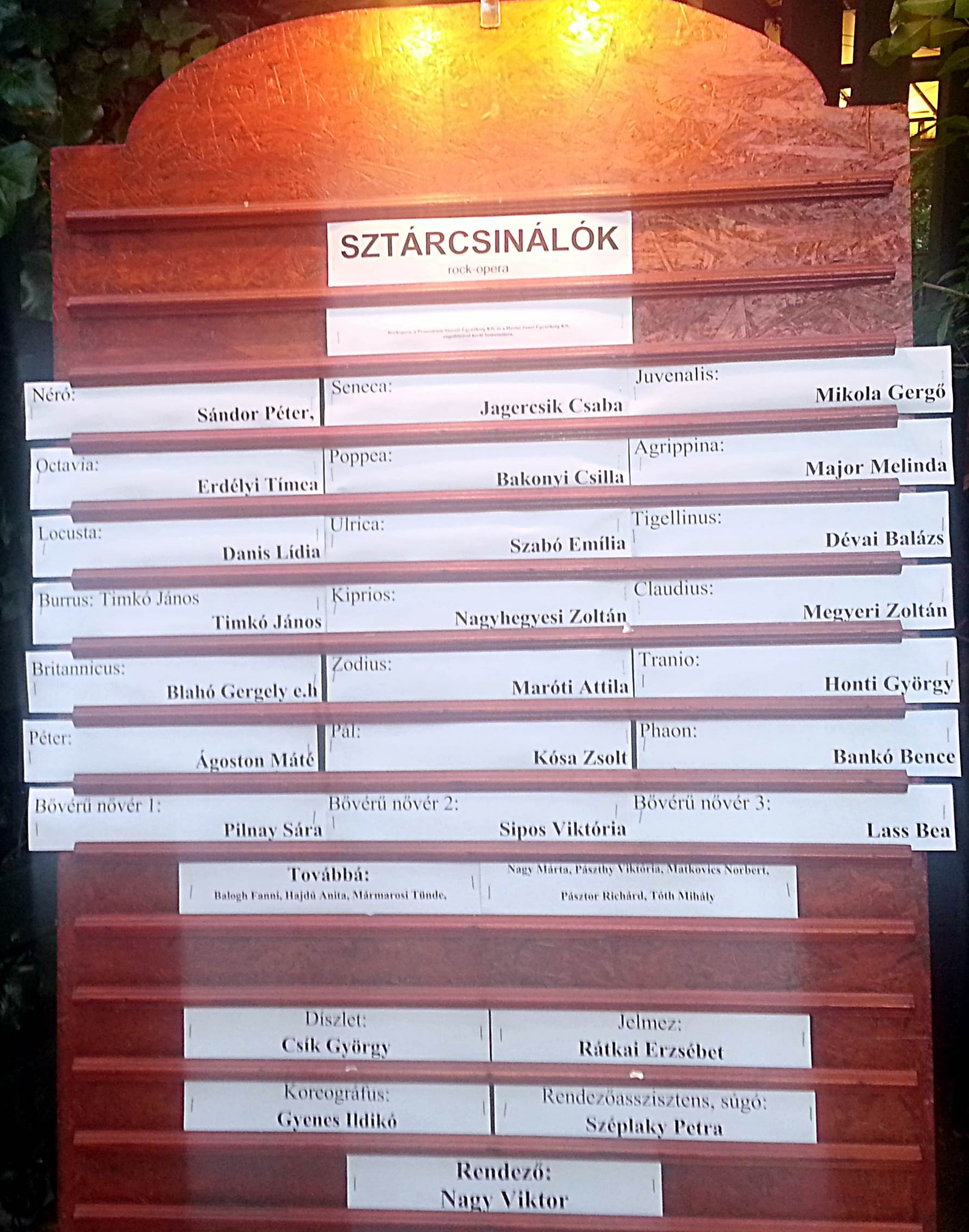 Sztárcsinálók. A tatabányai Jászai Mari Színház színlapja (Budapest, Városmajori Szabadtéri Színpad)